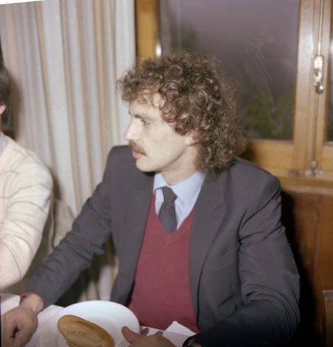 Jesus Mari Satrustegi in 1981